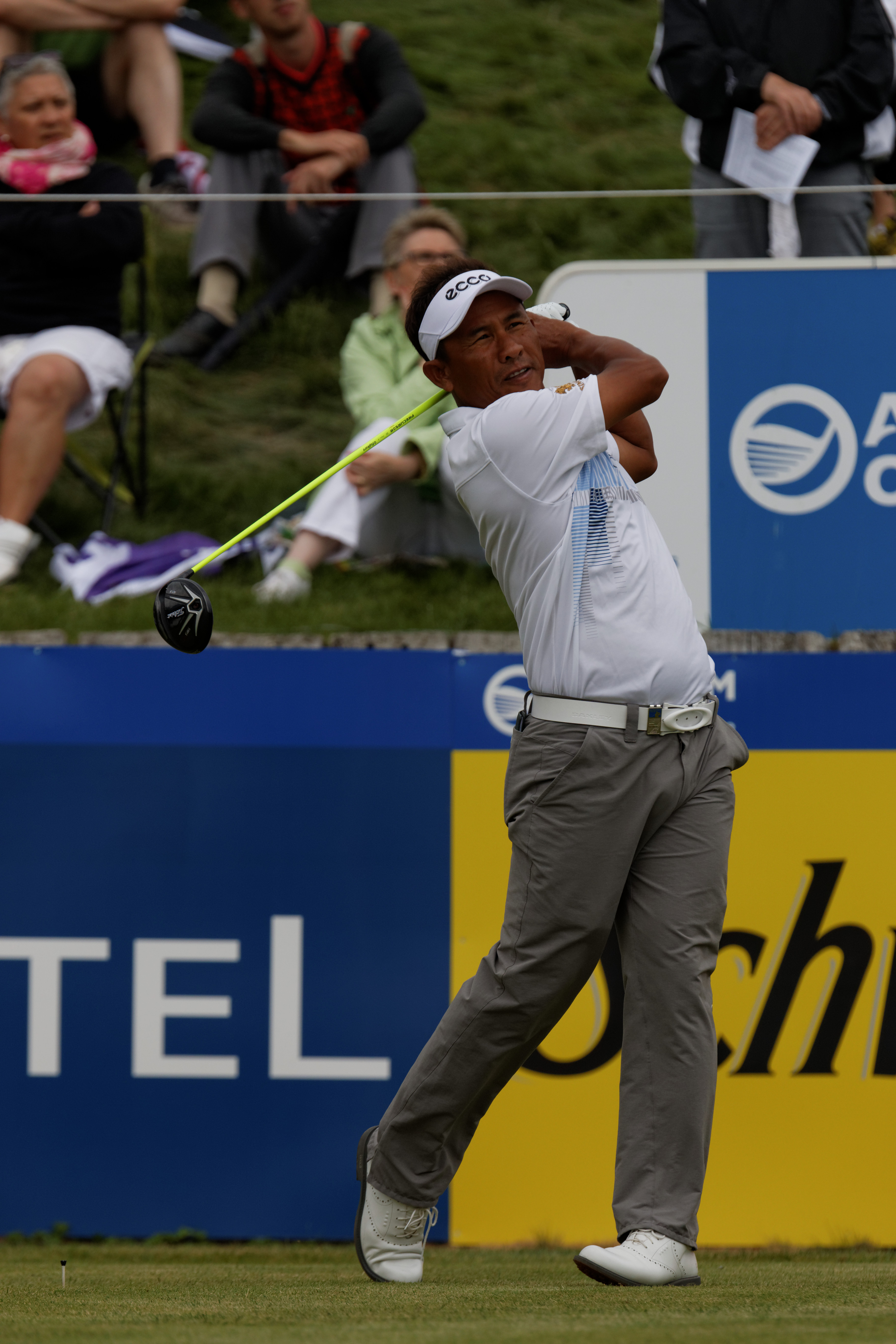 Thongchai Jaidee lors du second tour de l'Open de France 2014 - Golf National - Saint-Quentin-en-Yvelines (78) - départ du trou n° 1